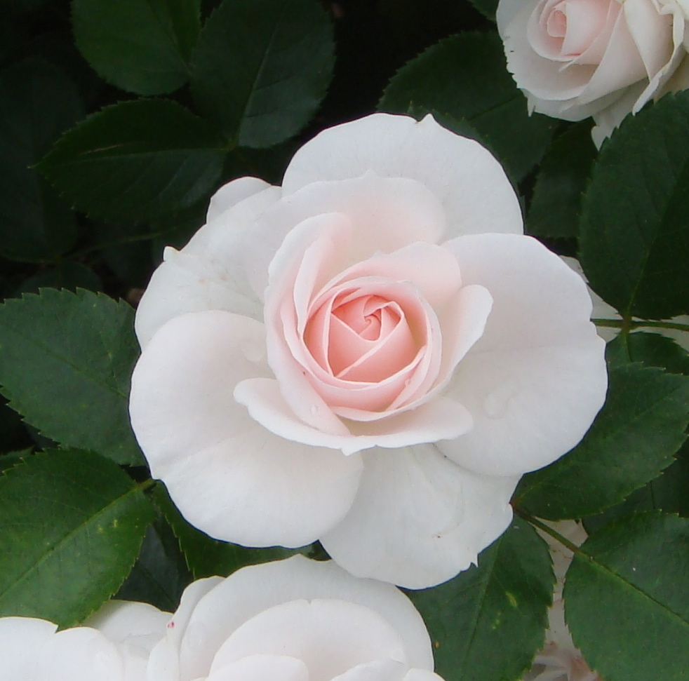 At the University Gardens in Frederiksberg - Landbohøjskolens Have.